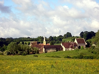 Vue de Dame Marie (Orne)